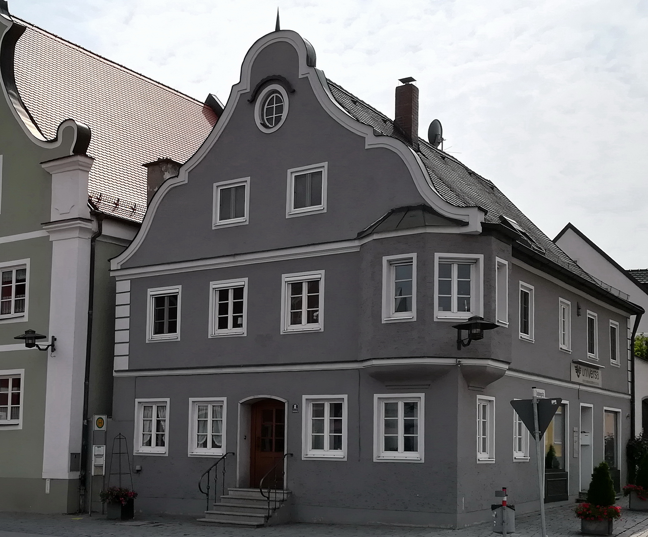 Zweigeschossiger, giebelständiger Satteldachbau mit geschweiftem Giebel und polygonalem Eckerker, Anfang 18. Jahrhundert, Erker 1914